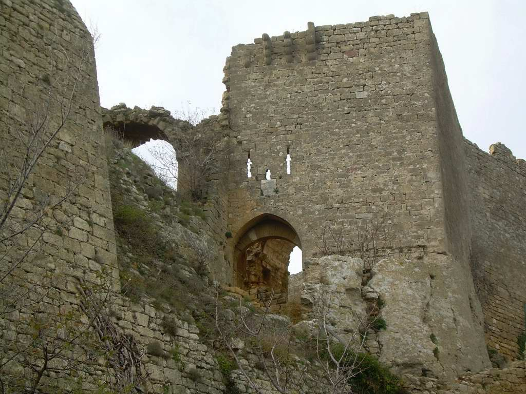 Ruines du château de Vernègues